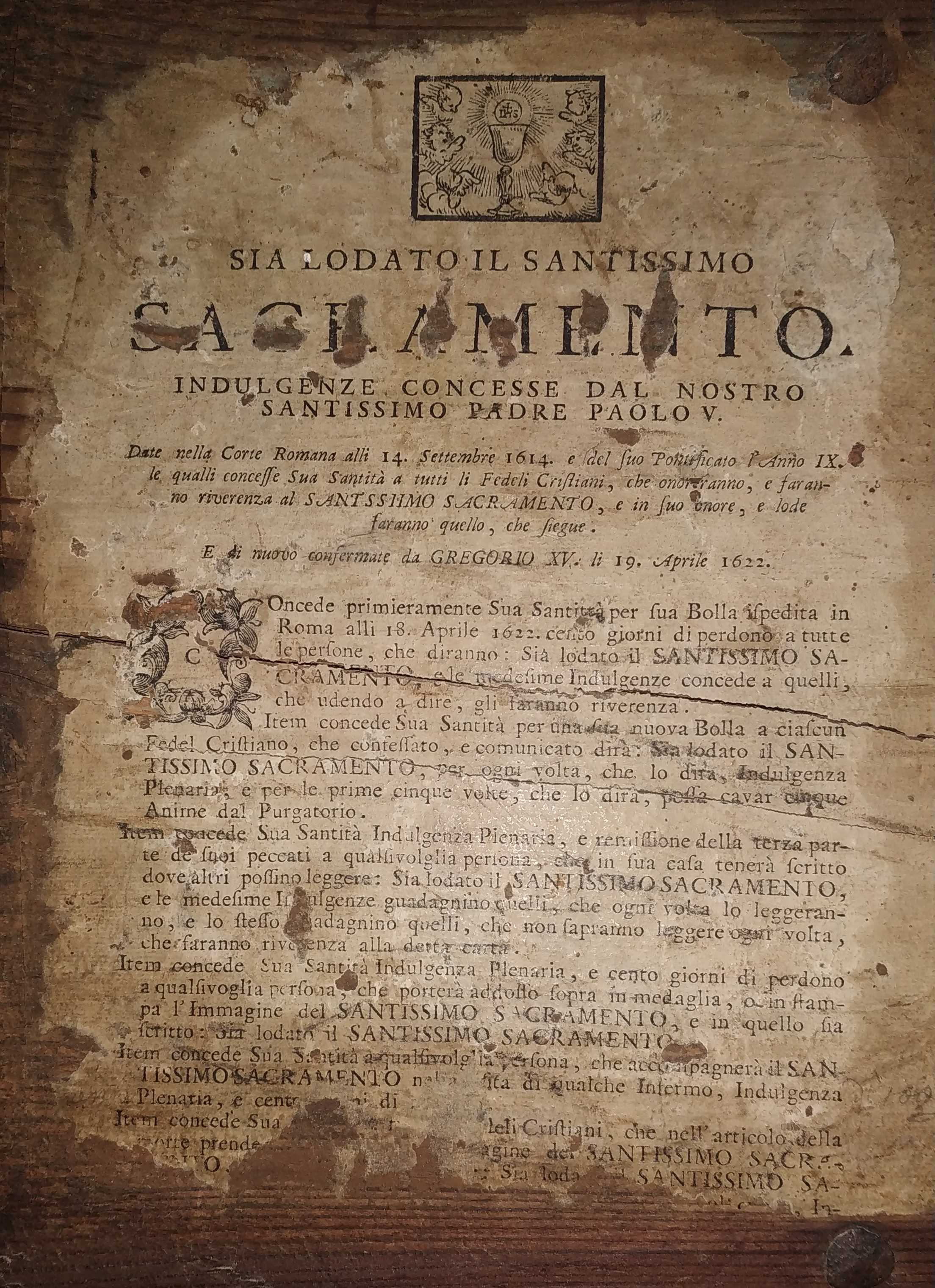 Concede primariamente Sua Santità per sua Bolla spedita in Roma allì 18 Aprile 1622. cento giorni di perdono per tutte le persone, che diranno,: Sia lodato SANTISSIMO SACRAMENTO, e le medesime Indulgenze concede a quelli, che udendo a dire, gli faranno riverenza. Item concede Sua Santità per sua nuova Bolla a ciascun Fedel Cristiano, che confessato,e comunicato dirà: Sia lodato SANTISSIMO SACRAMENTO, per ogni volta, che lo dirà, Indulgenza Plenaria, e per le prime cinque volte, che lo dirà, possa cavar cinque Anime dal Purgatorio. Item concede Sua Santità Indulgenza Plenaria, e remissione della terza parte dei suoi peccati a qualsivoglia persona, che in sua casa tenerà scritto dove altri possino leggere: Sia lodato il SANTISSIMO SACRAMENTO, e le medesime indulgenze guadagnino quelli, che non sapranno leggere ogni volta, che faranno riverenza alla detta carta. Item concede Sua Santità Indulgenza Plenaria, e cento giorni di perdono a qualsivoglia persona, che porterà addosso sopra in medaglia, o in stampa l'Immagine del SANTISSIMO SACRAMENTO, e in quello sia scritto: sia lodato il SANTISSIMO SACRAMENTO.